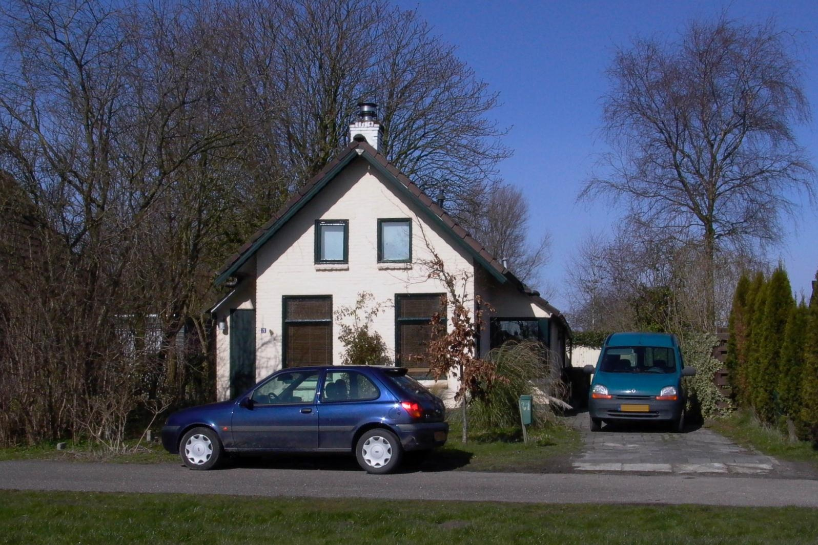 De voormalige woning van Richard Klinkhamer aan de G. Gernaatweg 21 in Ganzedijk / Hongerige Wolf. Foto: Daniel van der Ree, 23 maart 2008